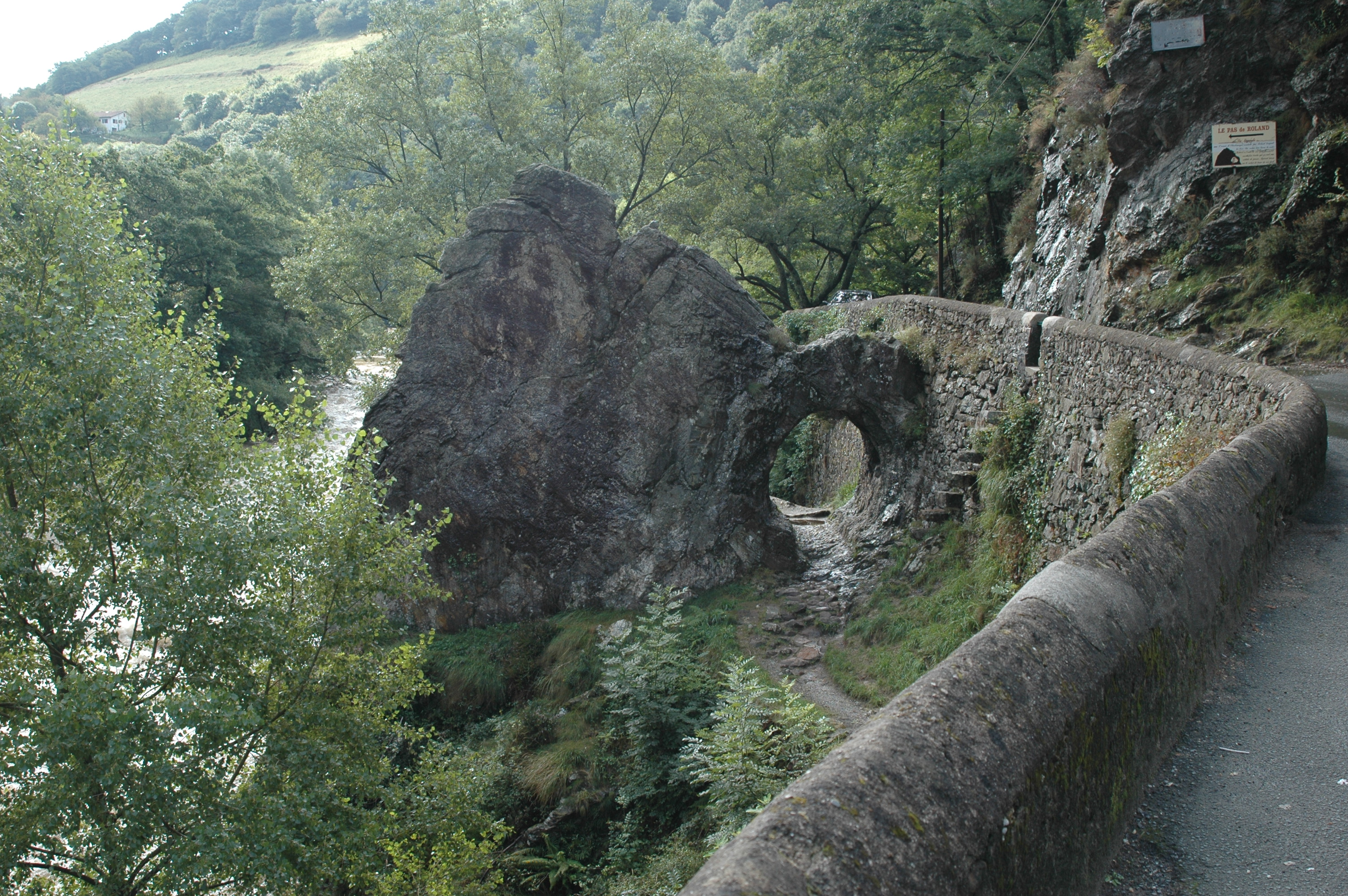 Itxassou, le Pas-de-Roland, le long de la Nive.